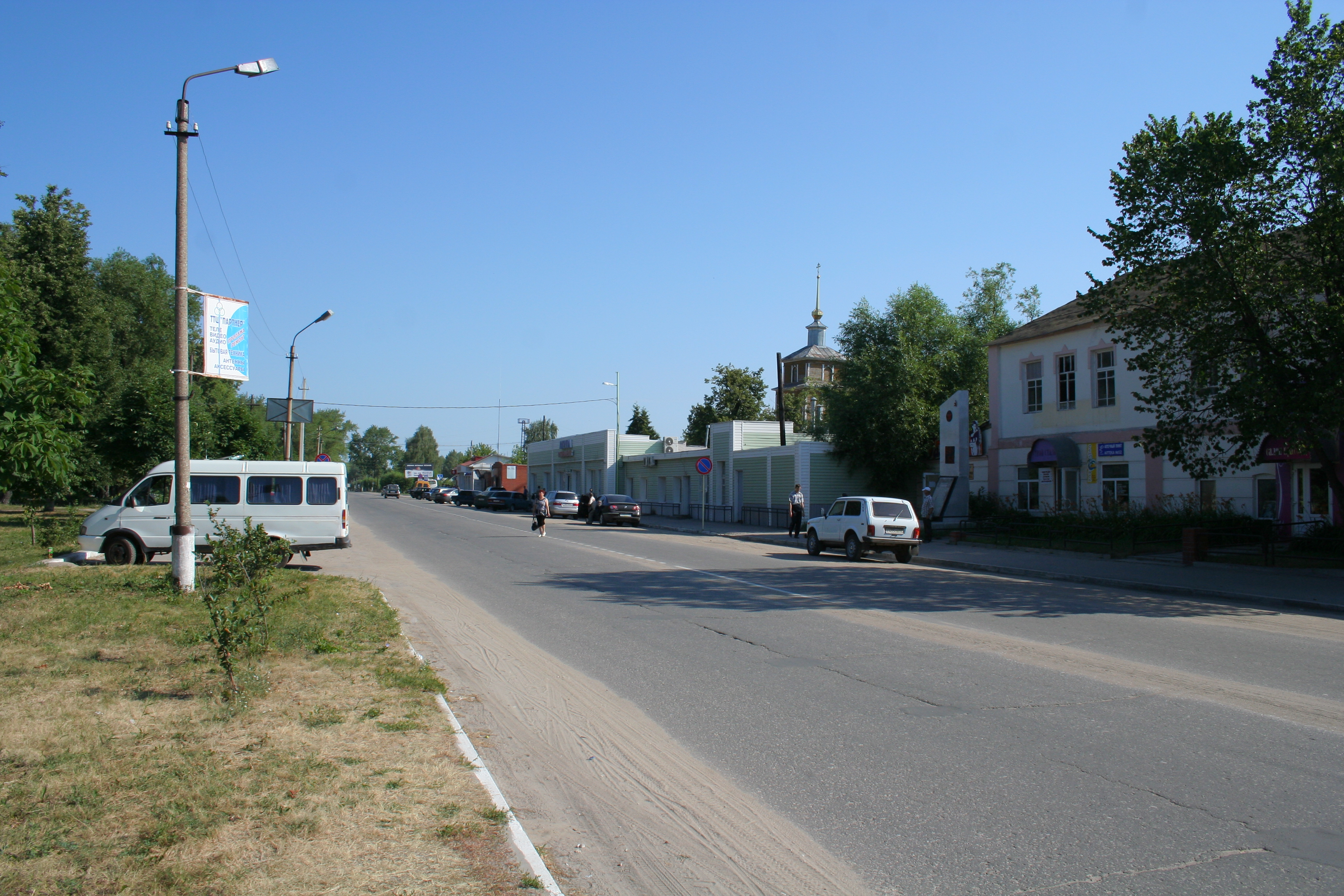 Stadt Spassk (Oblast Rjasan, Russland). Im Stadtzentrum.